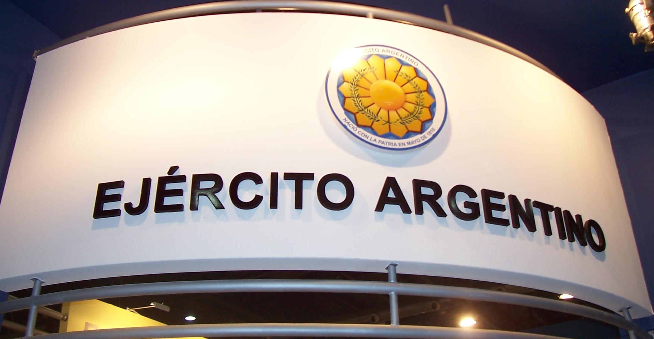 El Ejército Argentino en la 33° Feria Internacional del Libro